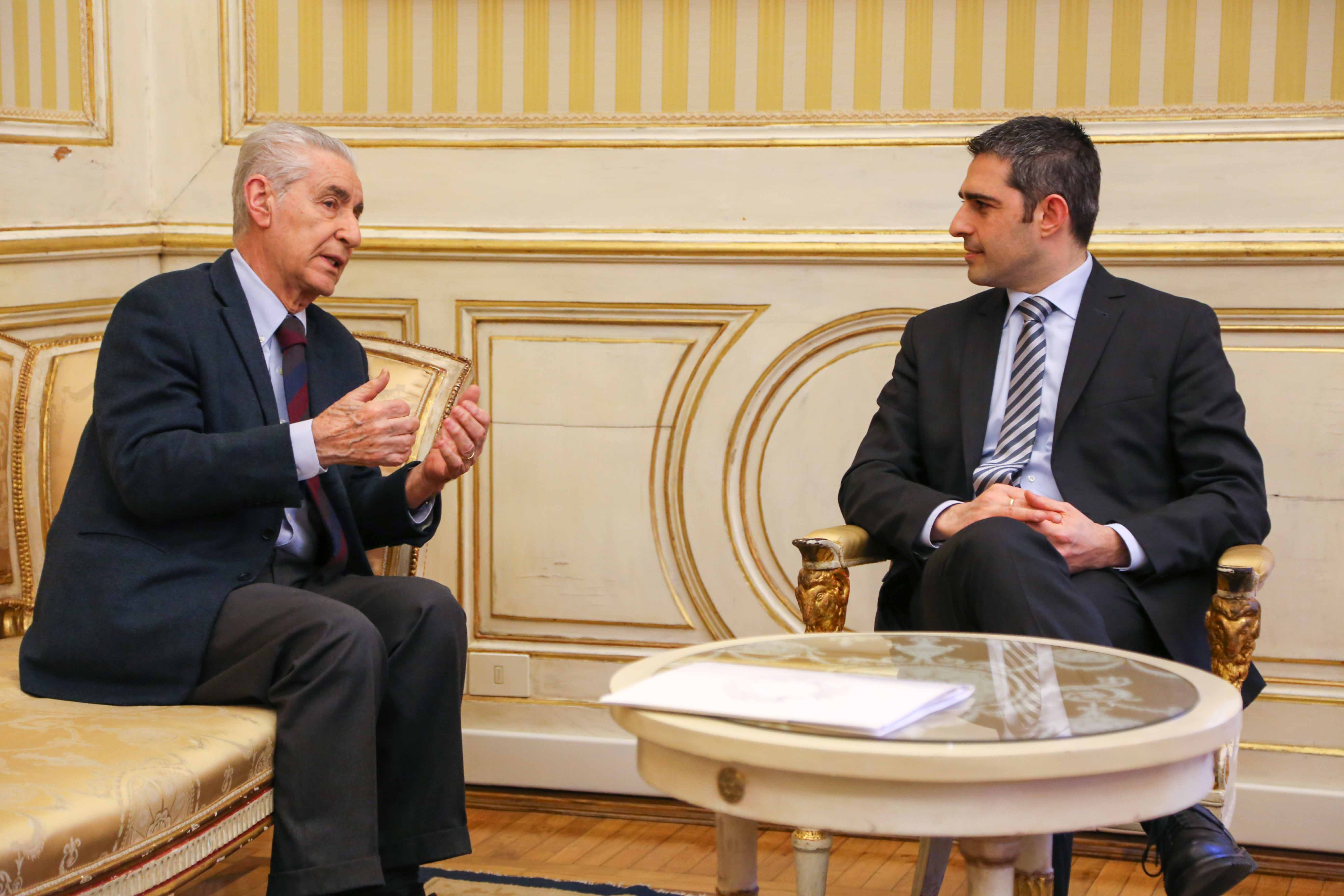 Il sindaco Pizzarotti incontra Rodotà (24/02/2014)